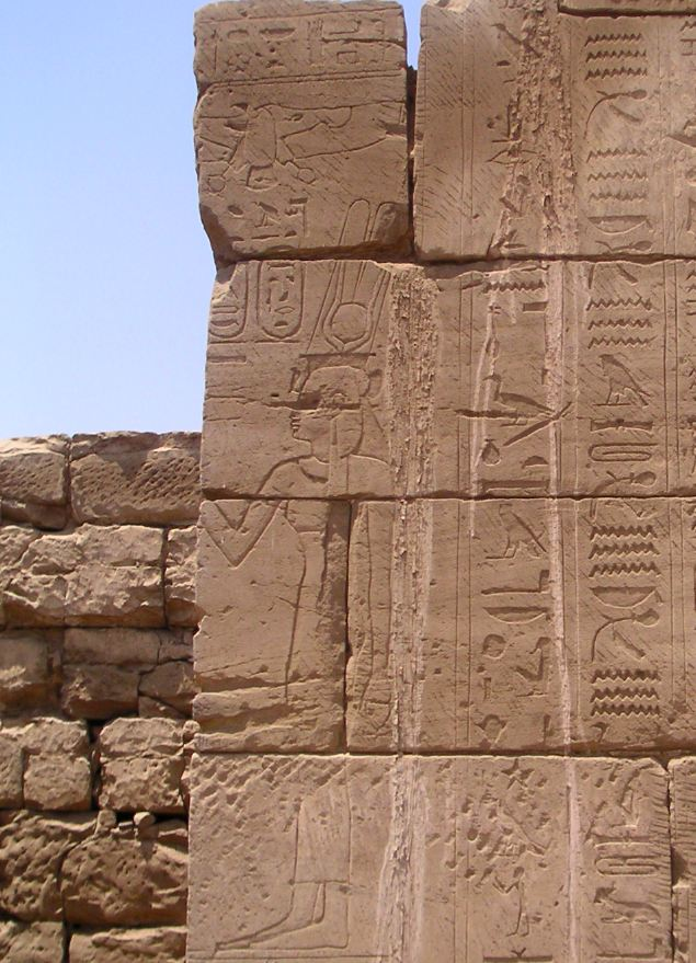 Relief représentant la divine adoratrice Nitocris Ire fille de Psammétique Ier - Chapelle des divines adoratrices Nitocris Ire et Ânkhnesnéferibrê à Karnak - XXVIe dynastie égyptienne